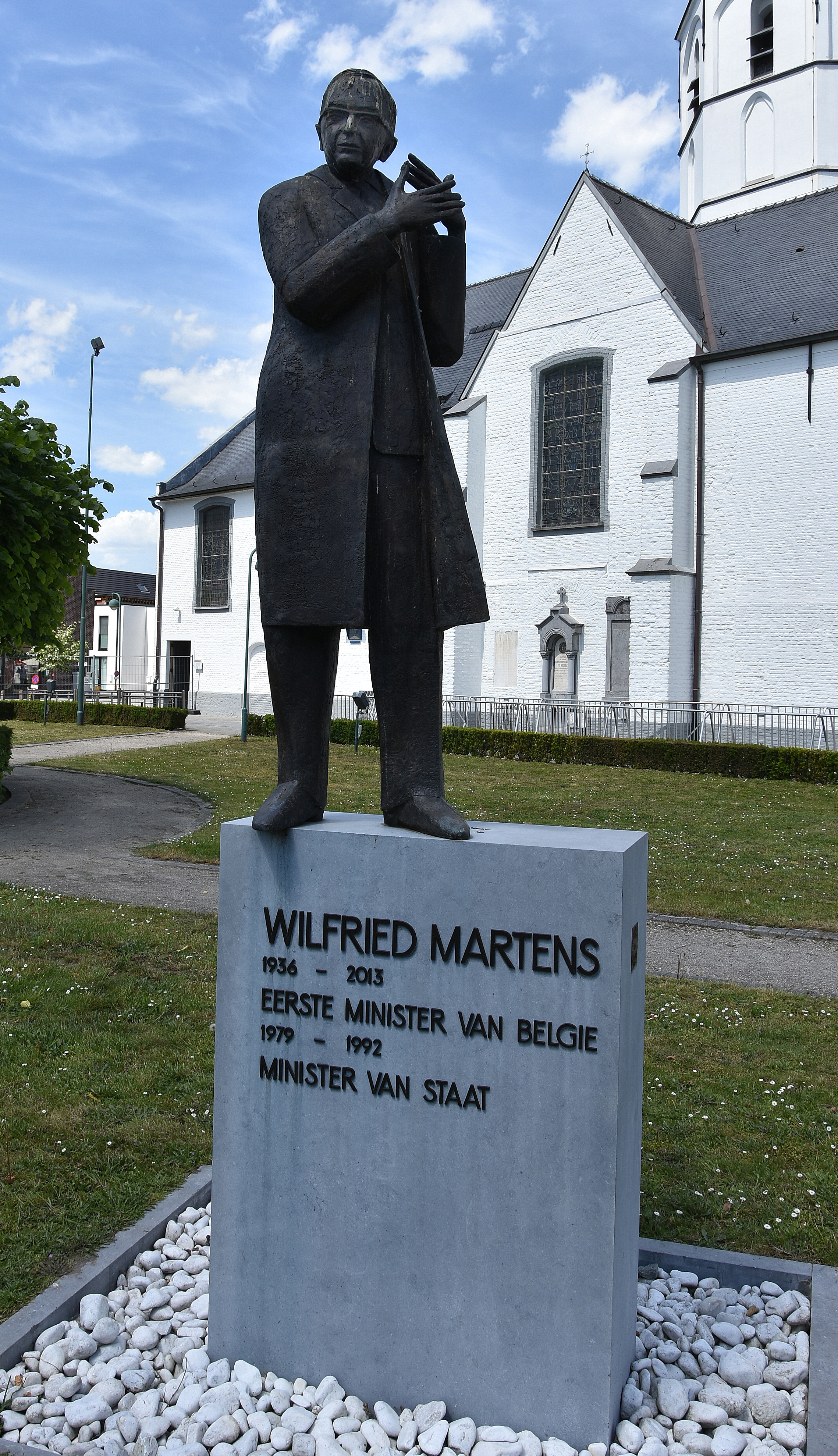 Leo De Buysere (1940) Wilfried Martens (Sleidinge) 2-06-2019